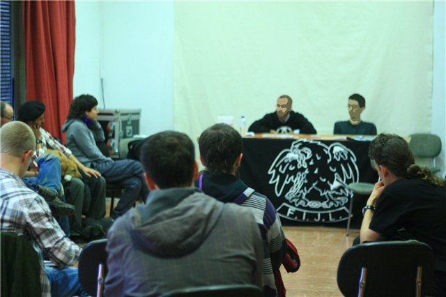 участник испанской секции М.С.А. на встрече по российской революции 17 года